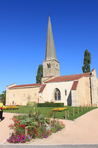 Meillard (03) Eglise Saint Martin